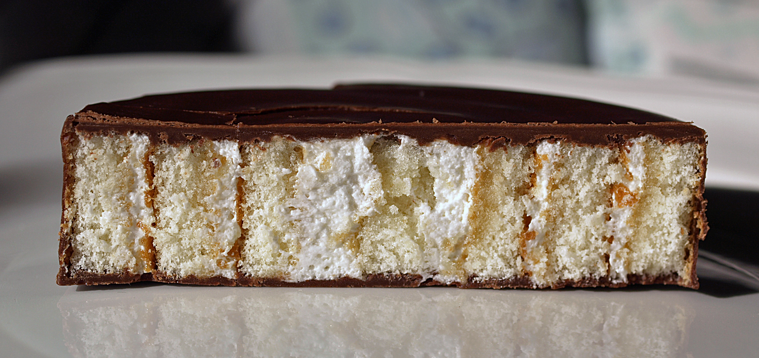 Phoskitos (Nutrexpa)